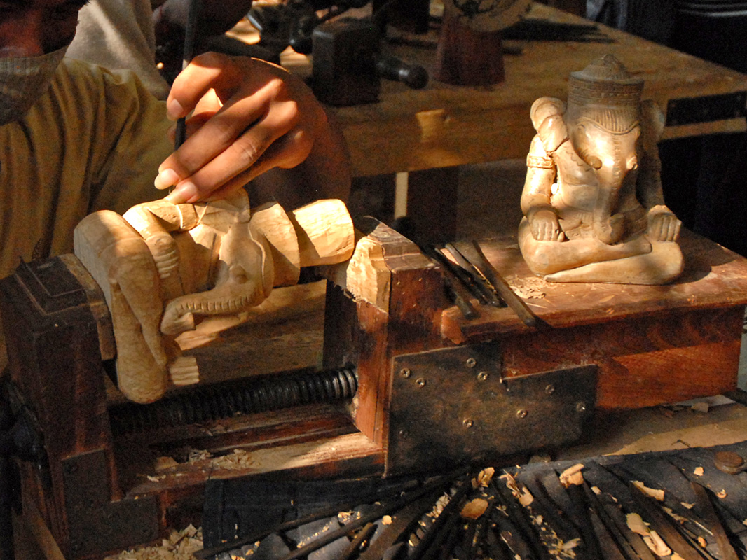 Atelier de formation de jeunes sculpteurs Au cours des dernières années, Artisans d’Angkor a étendu son champ d'activités permettant de sortir l'entreprise du cadre traditionnel de l'artisanat, en particulier vers des activités culturelles, de décoration et de création de gammes de produits haut de gamme destinés à une clientèle internationale ciblée.